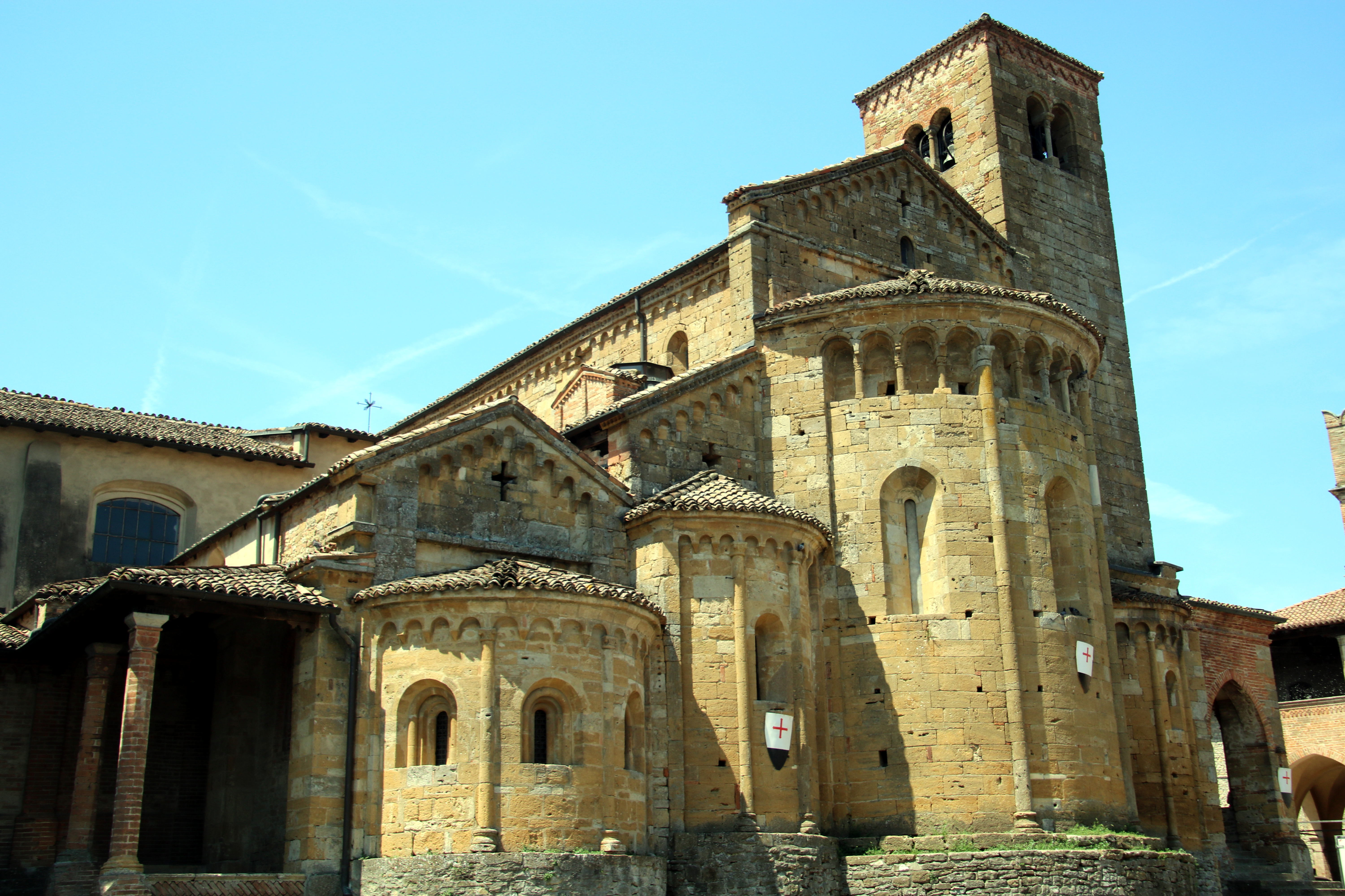 collegiata di Castell'Arquato This is a photo of a monument which is part of cultural heritage of Italy.